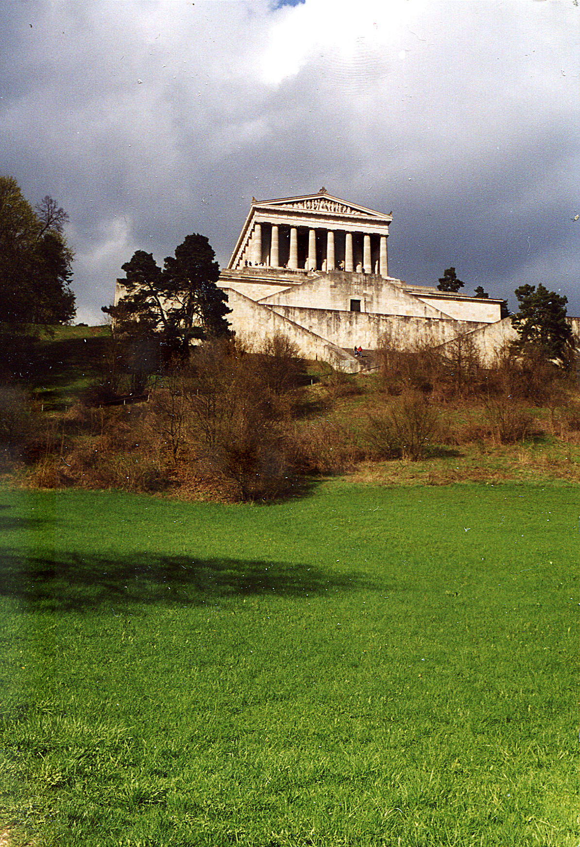 Валхалла - Зал немецкой славы